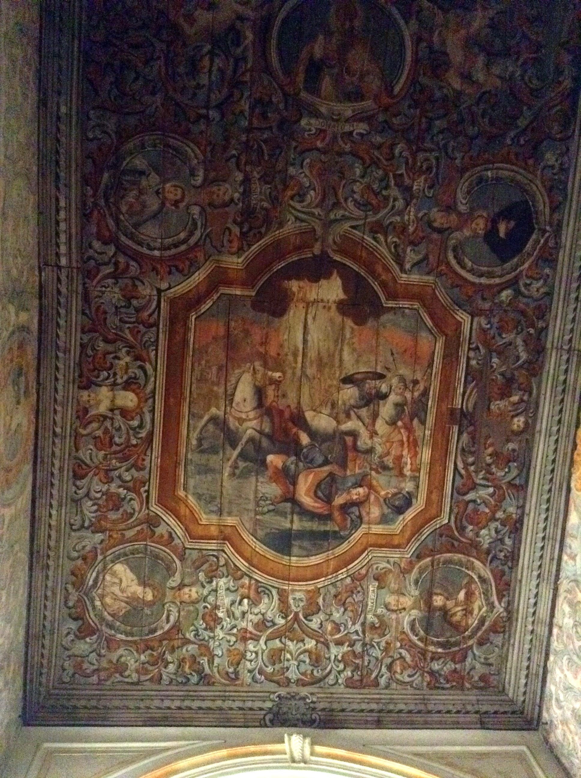 Kirche San Pietro Caveoso